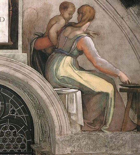 Sistine Chapel, fresco Michelangelo.